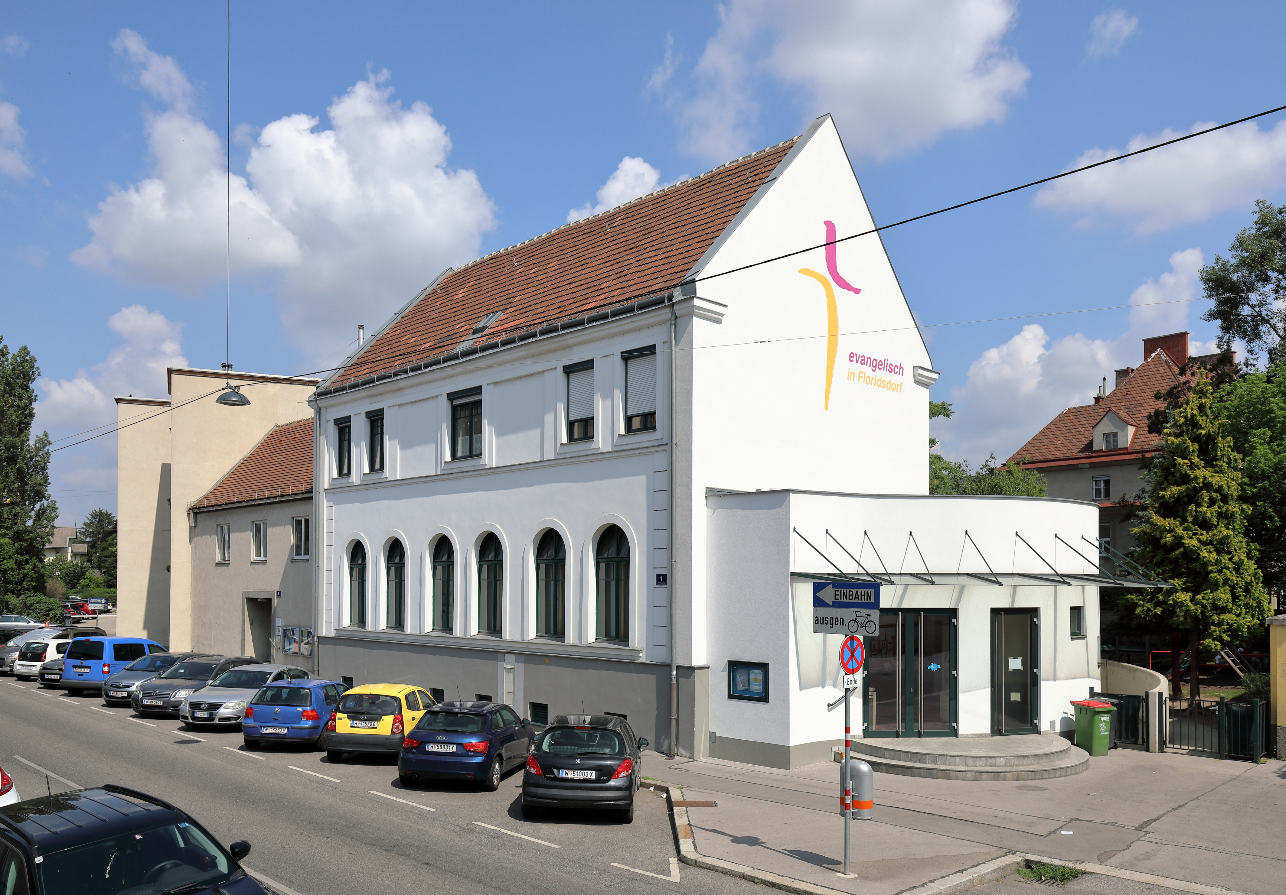 Südostansicht der evangelischen Pfarrkirche Floridsdorf an der Adresse Weisselgasse 1 im 21. Wiener Gemeindebezirk Floridsdorf. Der Betsaal bzw. die Kirche mit der darüberliegenden Pfarrerswohnung wurde ab 1904 nach den Plänen des Architekten Gustav Knell errichtet und am 28. Jänner 1906 geweiht. Er wies secessionistische Züge und Einflüsse des Heimatstils auf, wobei die Fassade 1944 zerstört wurde. Im Jahr 2002 wurde der Eingangsbereich der Kirche von Grund auf neu gestaltet.